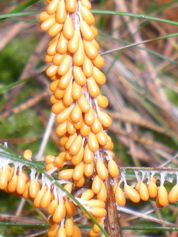 Myxomycota (Eumycetozoa, Mycetozoa): Leocarpus fragilis